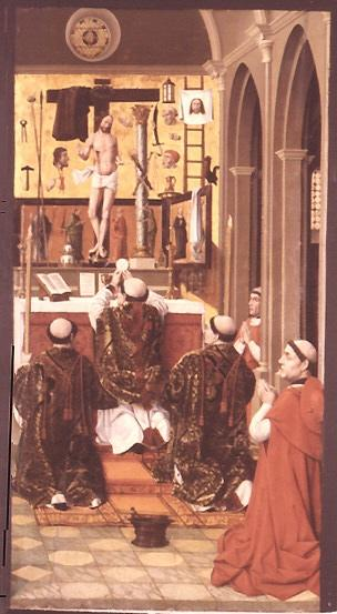 La obra representa al papa San Gregorio Magno, uno de los Padres de la Iglesia.